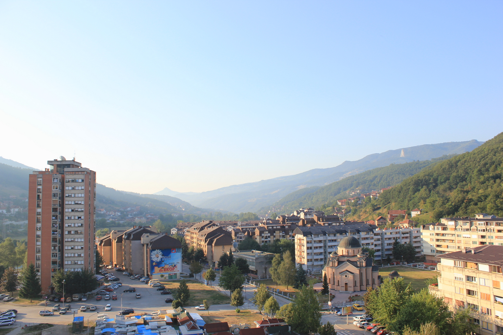 Blick über Novi Priboj, Serbien.Hornjoserbsce: Pohlad Noveho Priboja w Serbiskej.